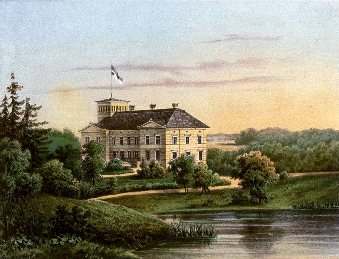 Gut Bauditten, Kreis Mohrungen, Provinz Ostpreußen